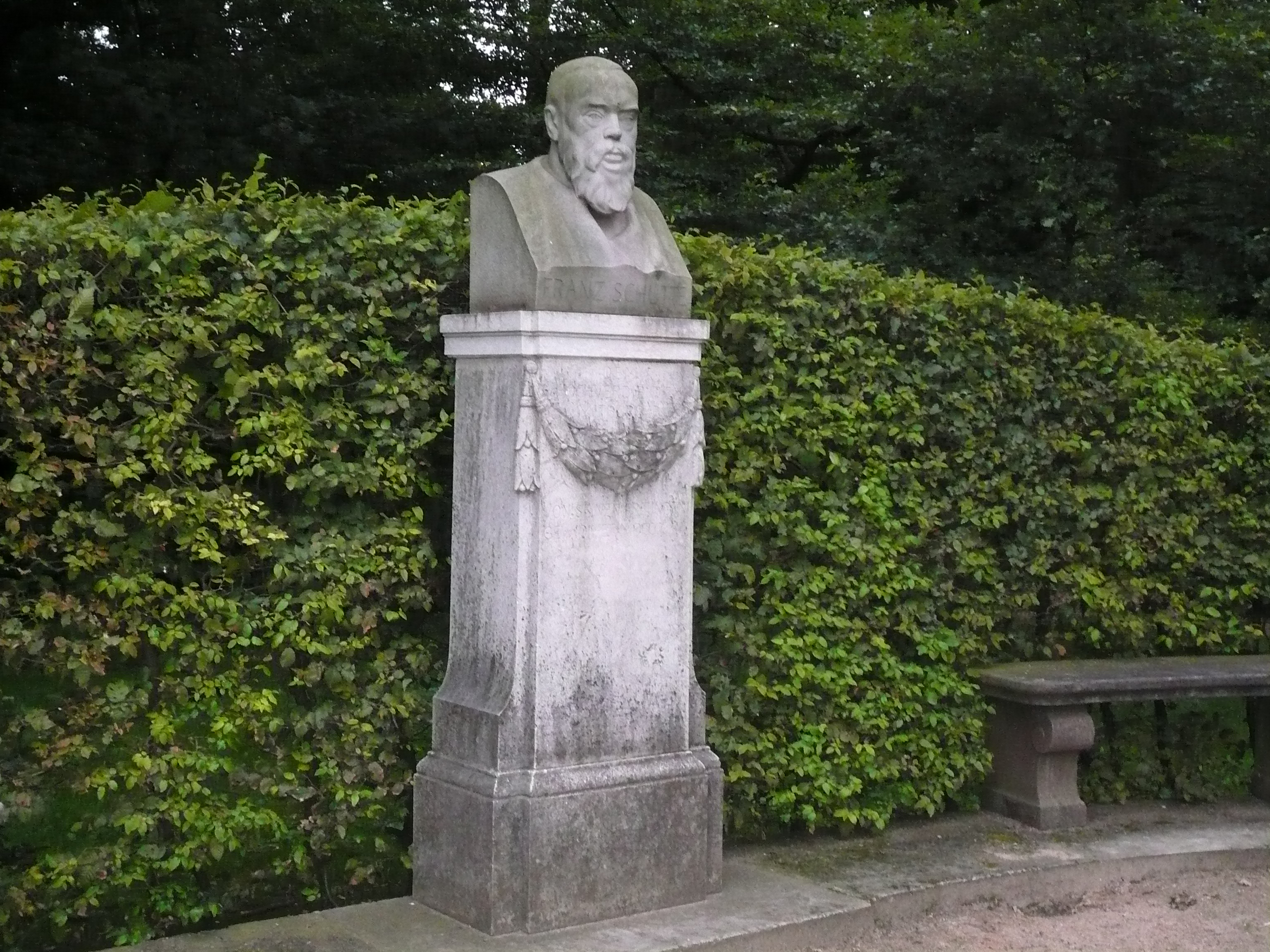 Die Schüttebüste im Bremer Bürgerpark. Bildhauer: Adolf von Hildebrand (Kopie) Das abgebildete Objekt ist ein geschütztes Kulturdenkmal in der Freien Hansestadt Bremen, mit der Nr. 0218,T022 beim Landesamt für Denkmalpflege registriert.